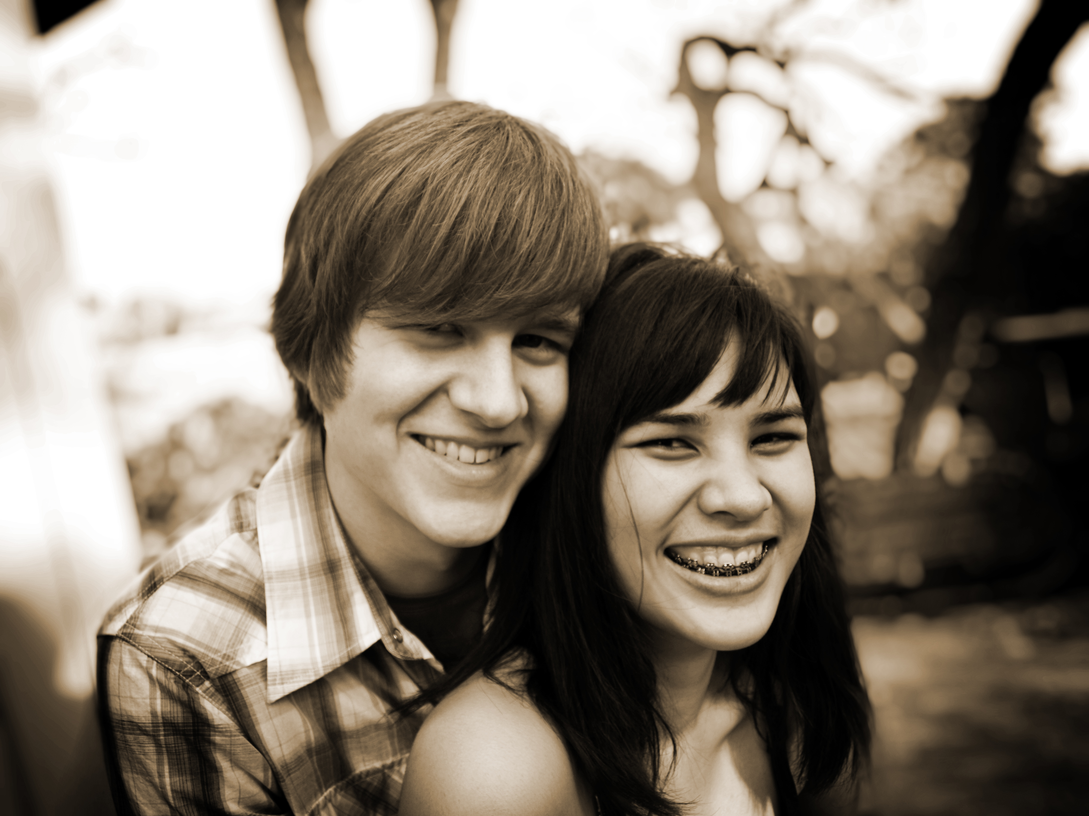 casal